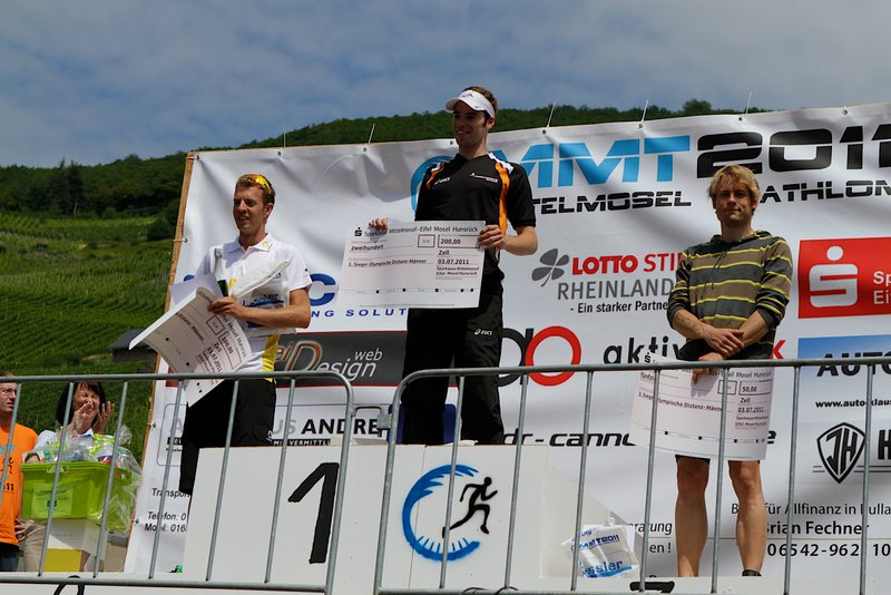 Mittelmosel Triathlon 2012